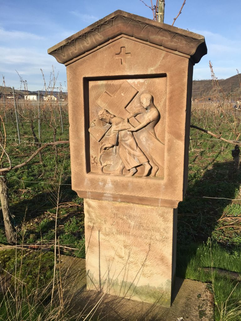 Kreuzweg Trittenheim - Station 3 von 14